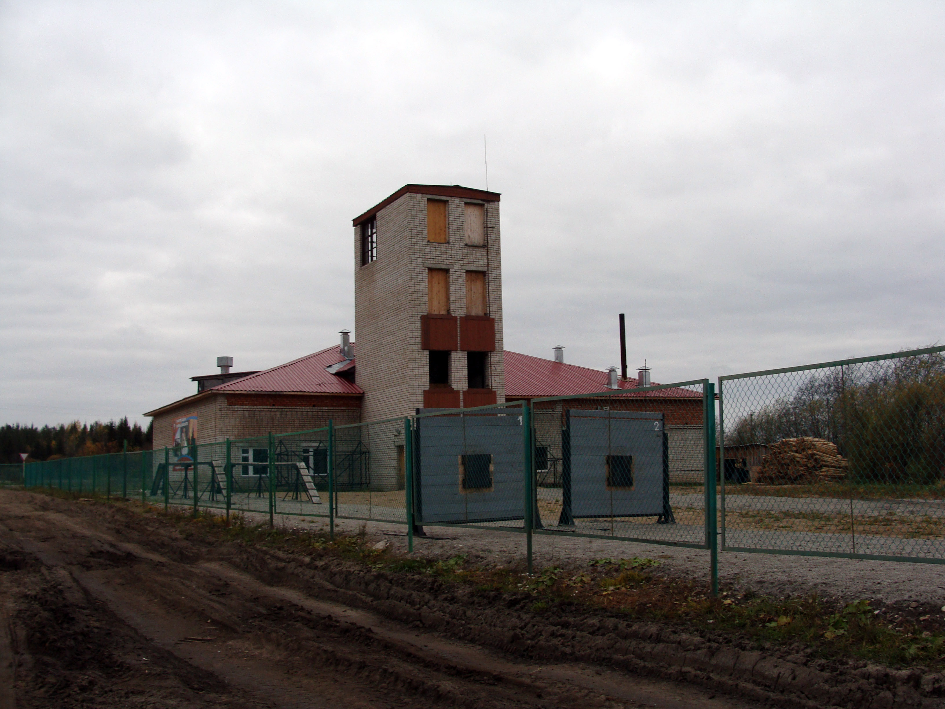 ПЧ-48 п. Шипицыно Архангельская область